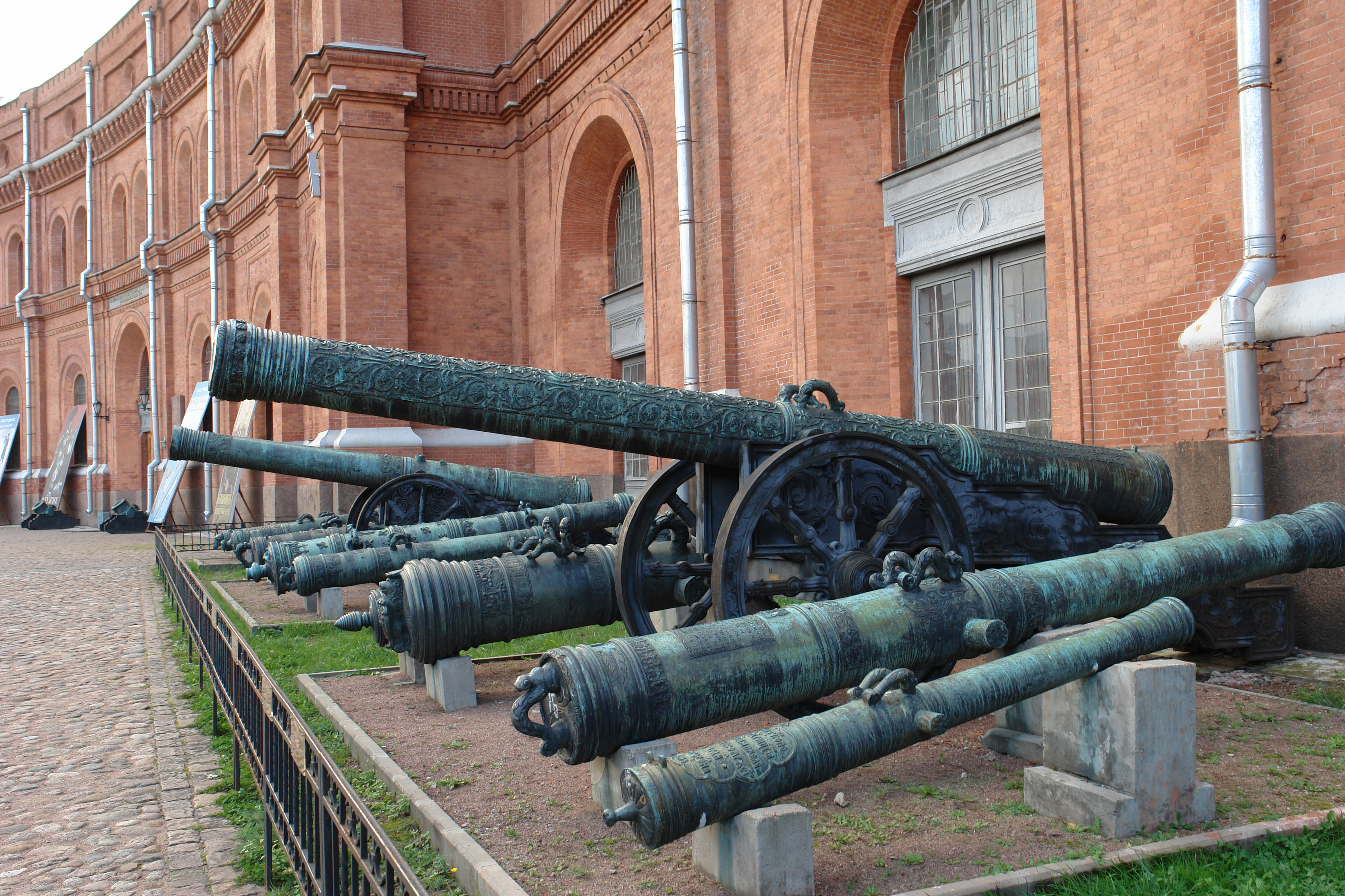 24-гривенковая (152-мм) осадная пищаль "Царь Ахиллес". Ствол бронзовый. Масса 3603 кг. Отлит в 1617 г мастером Андреем Чоховым.